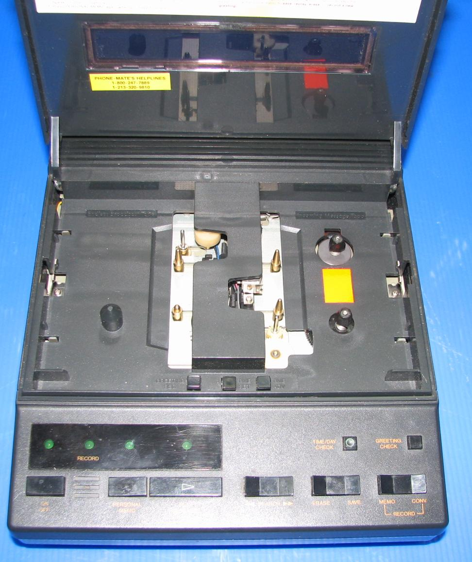 Автоответчик PHONE-MATE